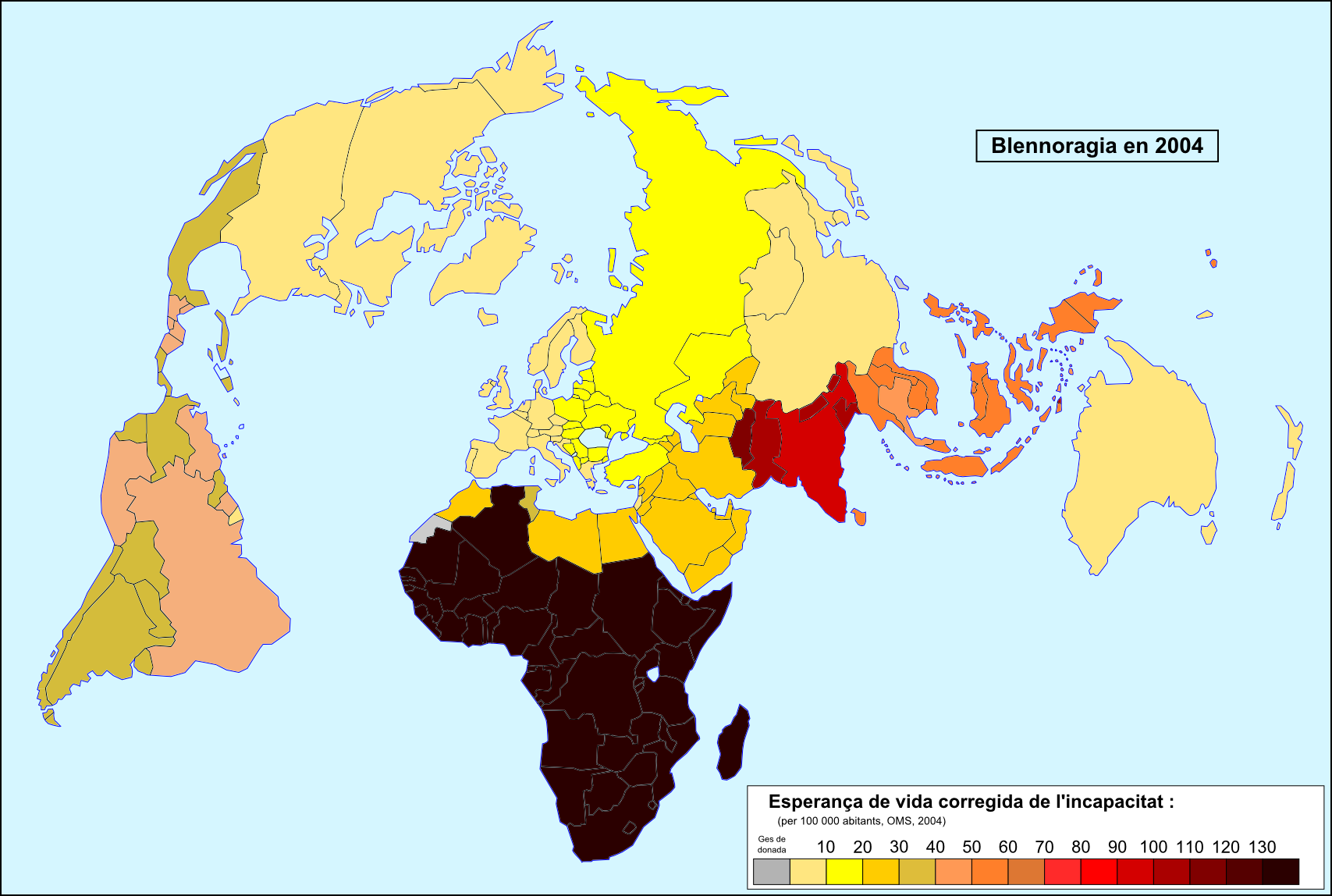 Esperança de vida corregida de l'incapacitat per la blennoragia en 2004